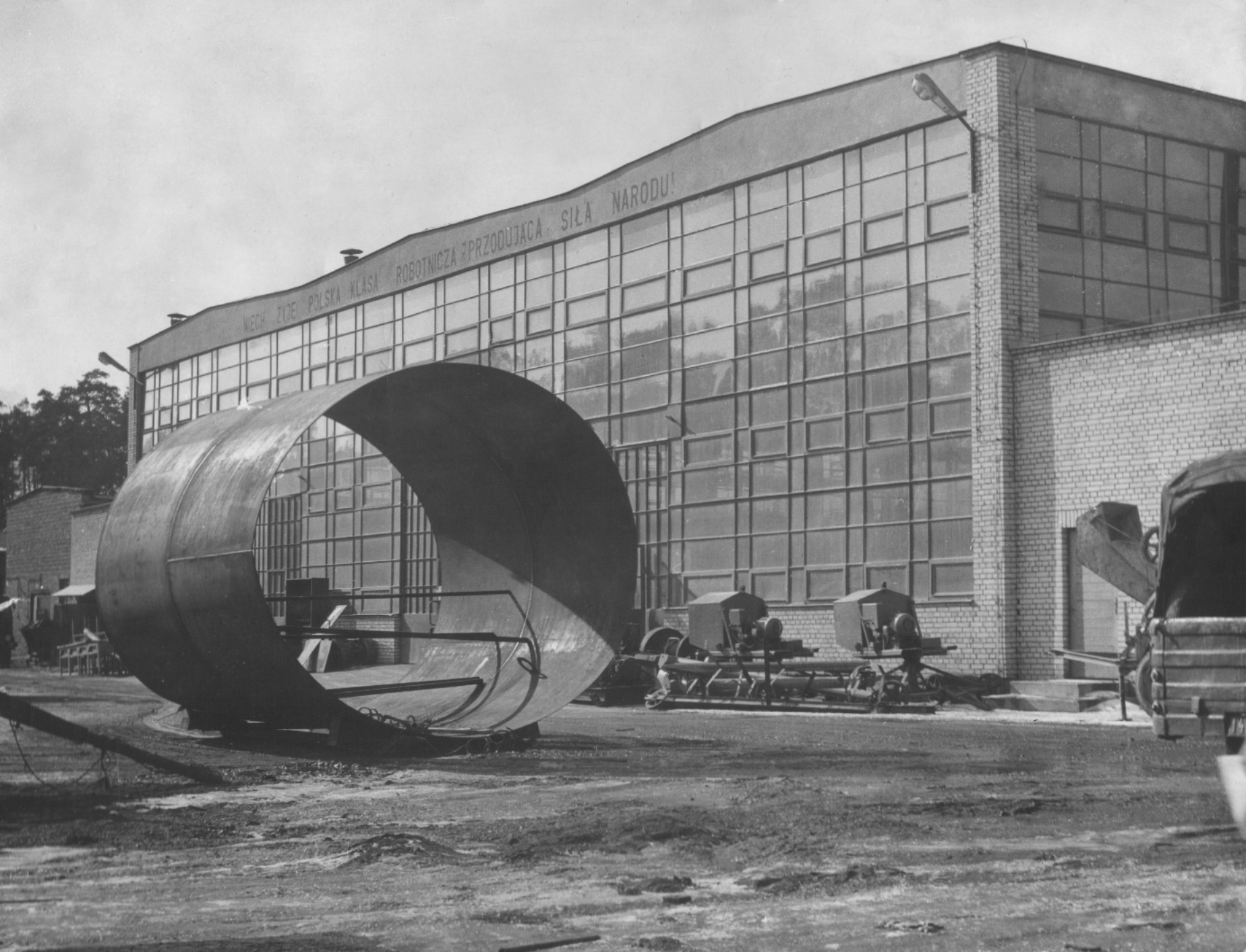 Hala warsztatów szkolnych Przedsiębiorstwa Montażowego „Montoerg”